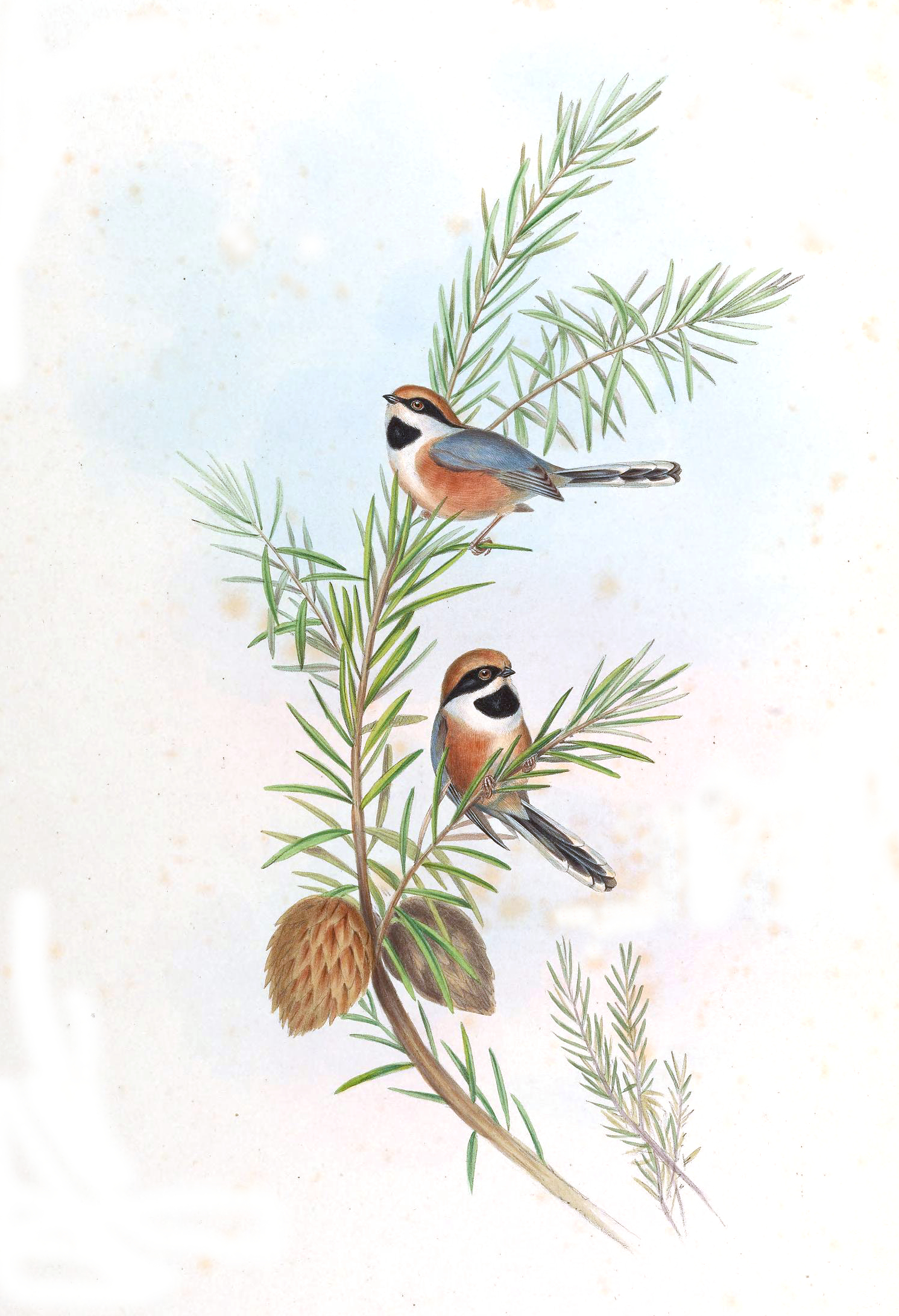 Psaltria concinna = Aegithalos concinnus